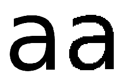 Беларуская (тарашкевіца): Параўнаньне якасьці контурных і растравых шрыфтаў: зьлева літара, атрыманая з контурнага шрыфту, справа — з растравага